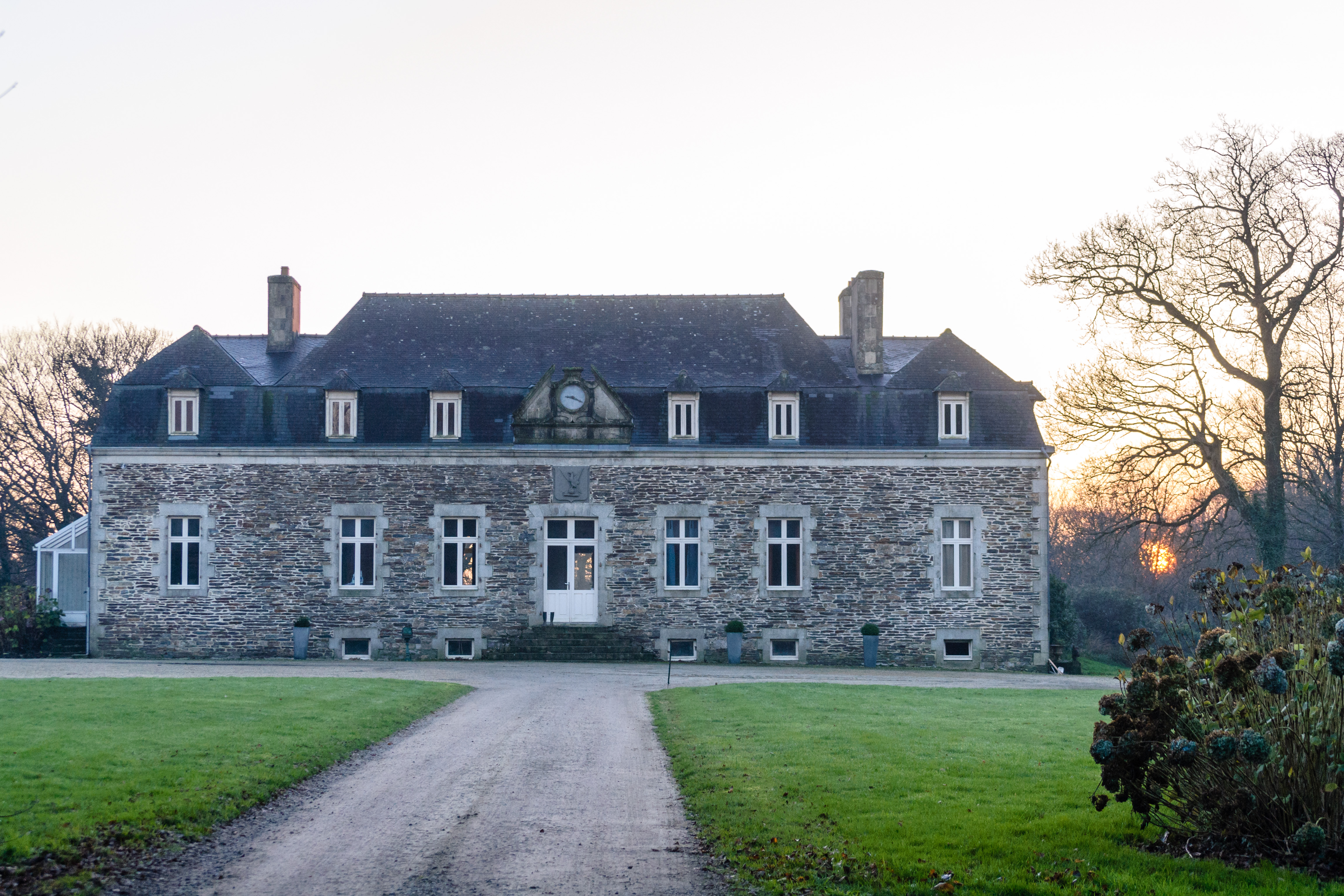 Le manoir de Menez Kamm à Spézet (Finistère), ayant été un foyer culturel breton dans les années 1970.